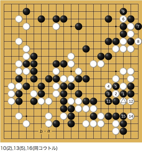 1960年5月30-31日 第15期本因坊戦挑戦手合七番勝負第4局 高川秀格-藤沢秀行(先番) 109-124手目